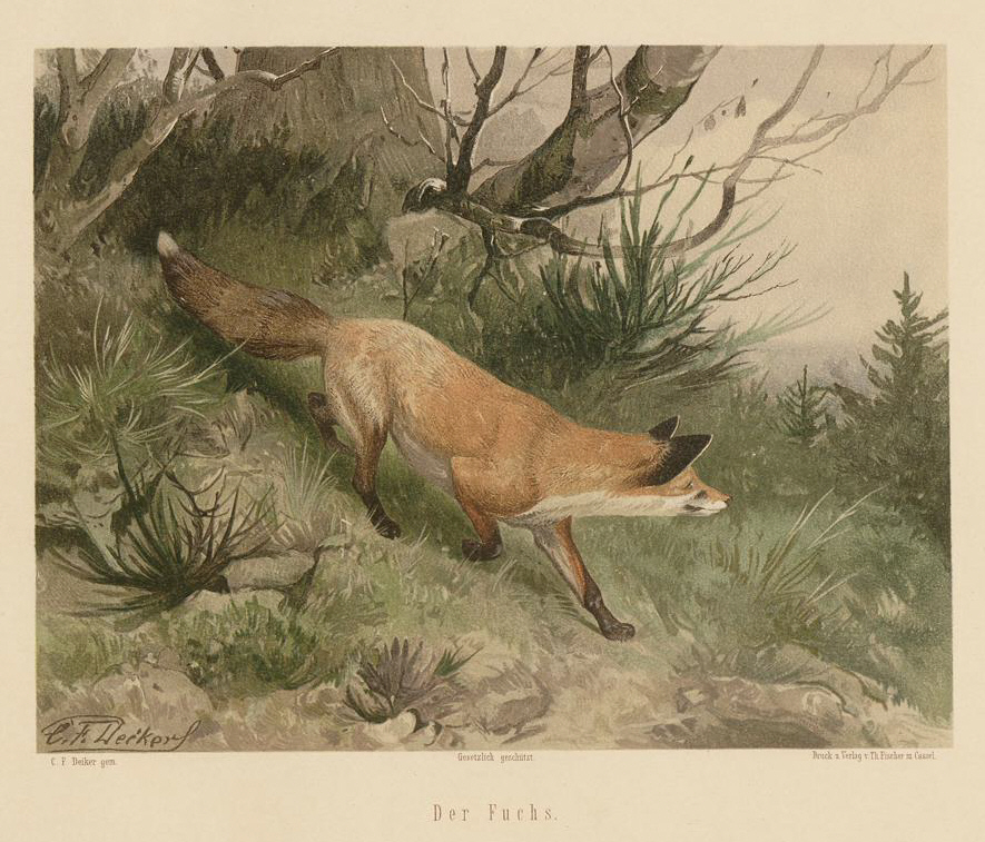 Chromolithographie aus der Serie „Jagdbare Thiere“ von Carl Friedrich Deiker Der Fuchs